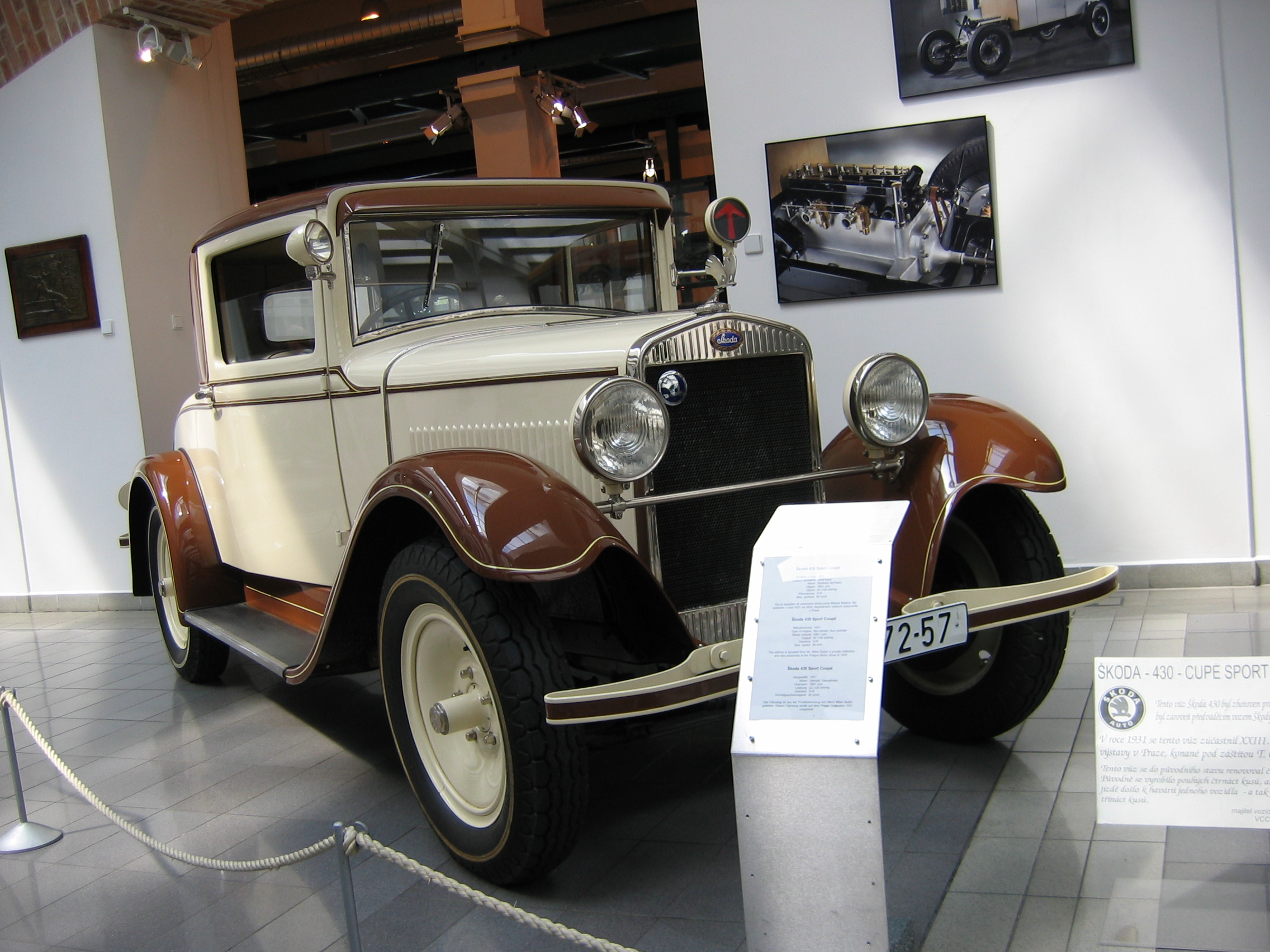 Škoda 430 - Škoda Auto Museum, Mlada Boleslav